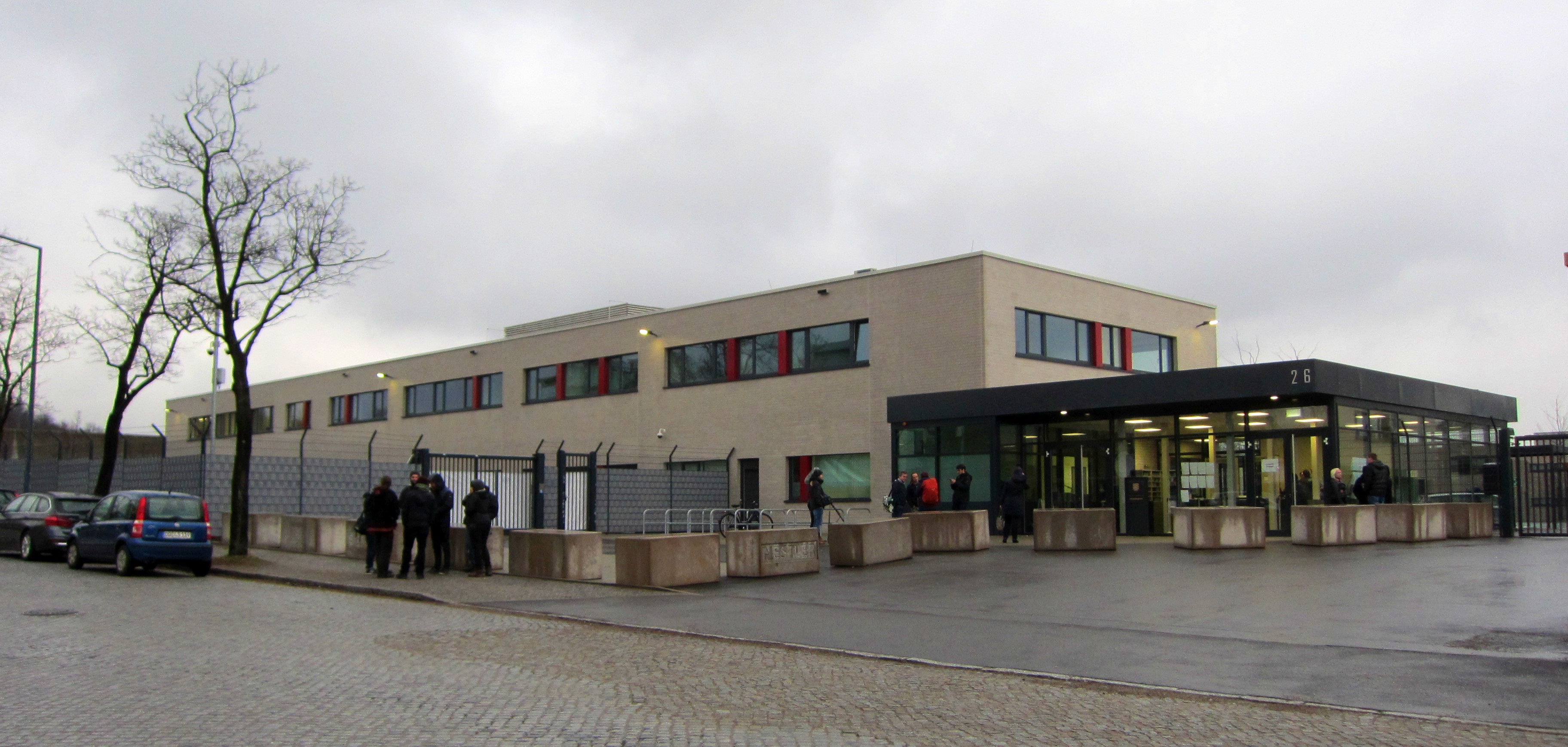 Außenstelle des Oberlandesgerichts Dresden im Hammerweg 26 für den Prozess gegen die Gruppe Freital am Ende des ersten Prozesstages